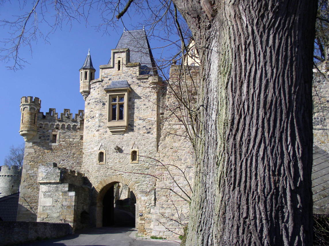 Eingangsportal Schloss Dhaun; im Vordergrund der Stamm des Naturdenkmals „Freiheitslinde“ (2010 gefällt)